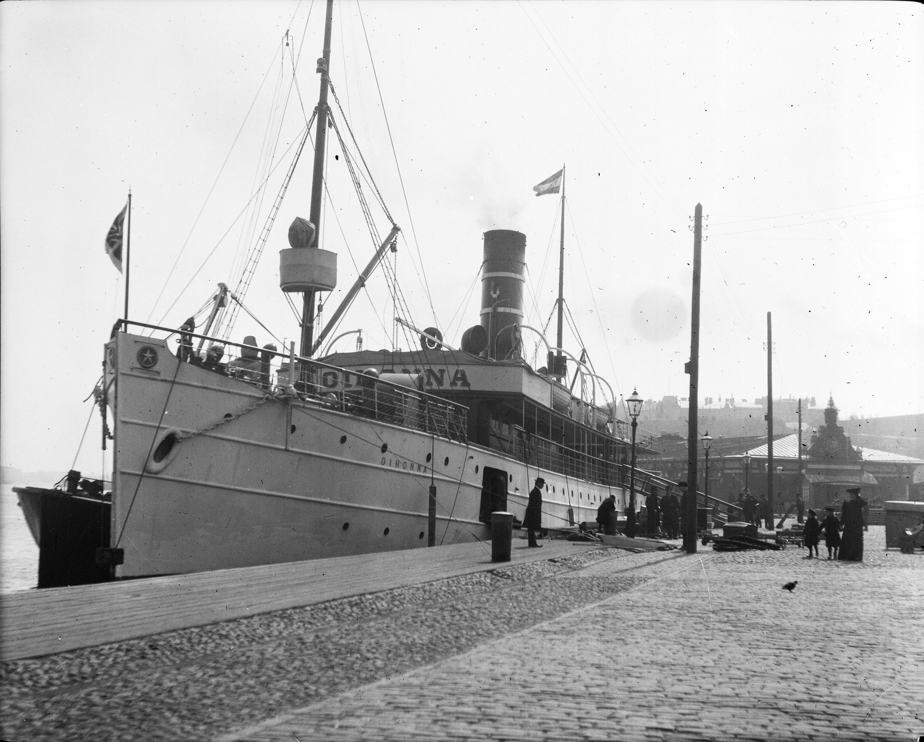 ”Oihonna” i Södra hamnen. Foto Frans Nyberg slsa817_35_145 Ur boken Helsingfors i ord och bild Utgiven av Svenska litteratursällskapet i Finland, 2012